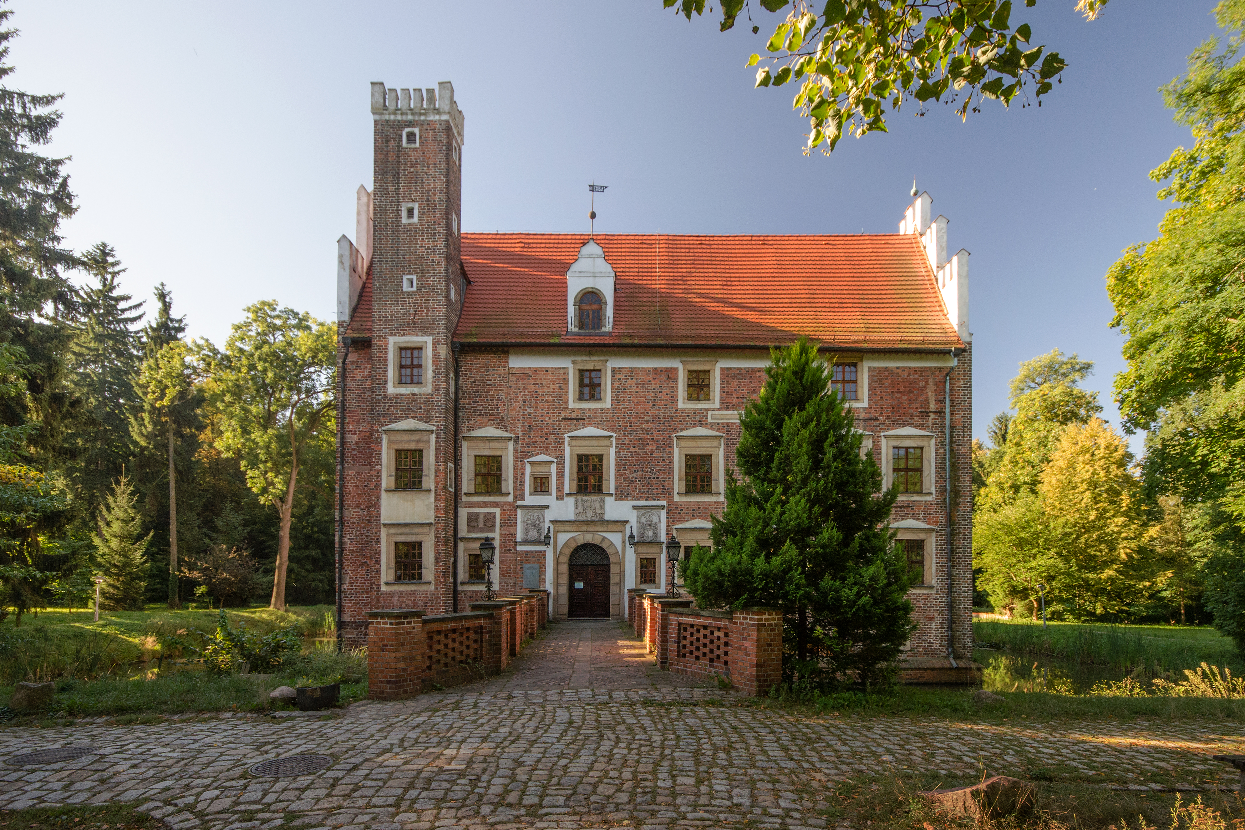 Wojnowice, zamek wodny, poł. XIV, poł. XVI